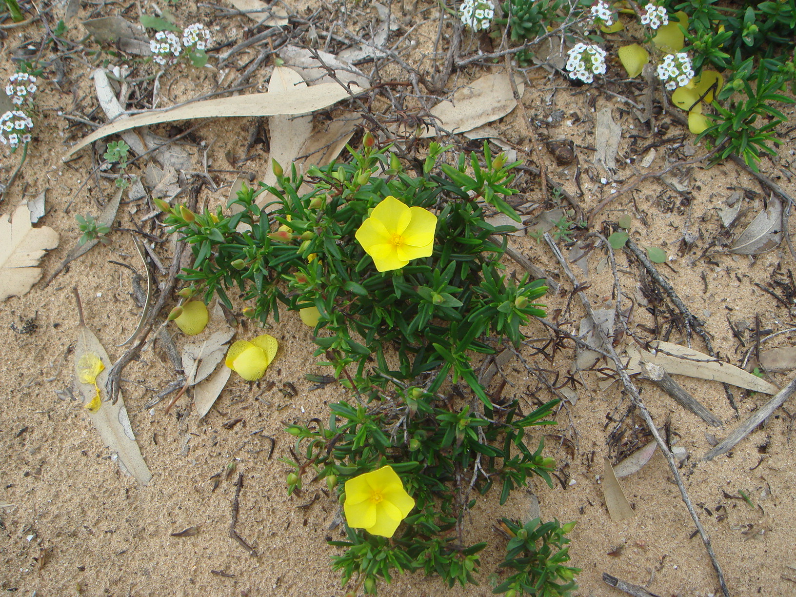 (Halimium calycinum), Chiclana (Cádiz) España